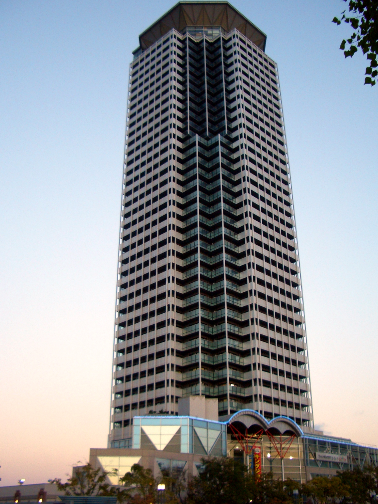 Melodo_Suita_BLD 2005118 in Suita city,Osaka,Japan.